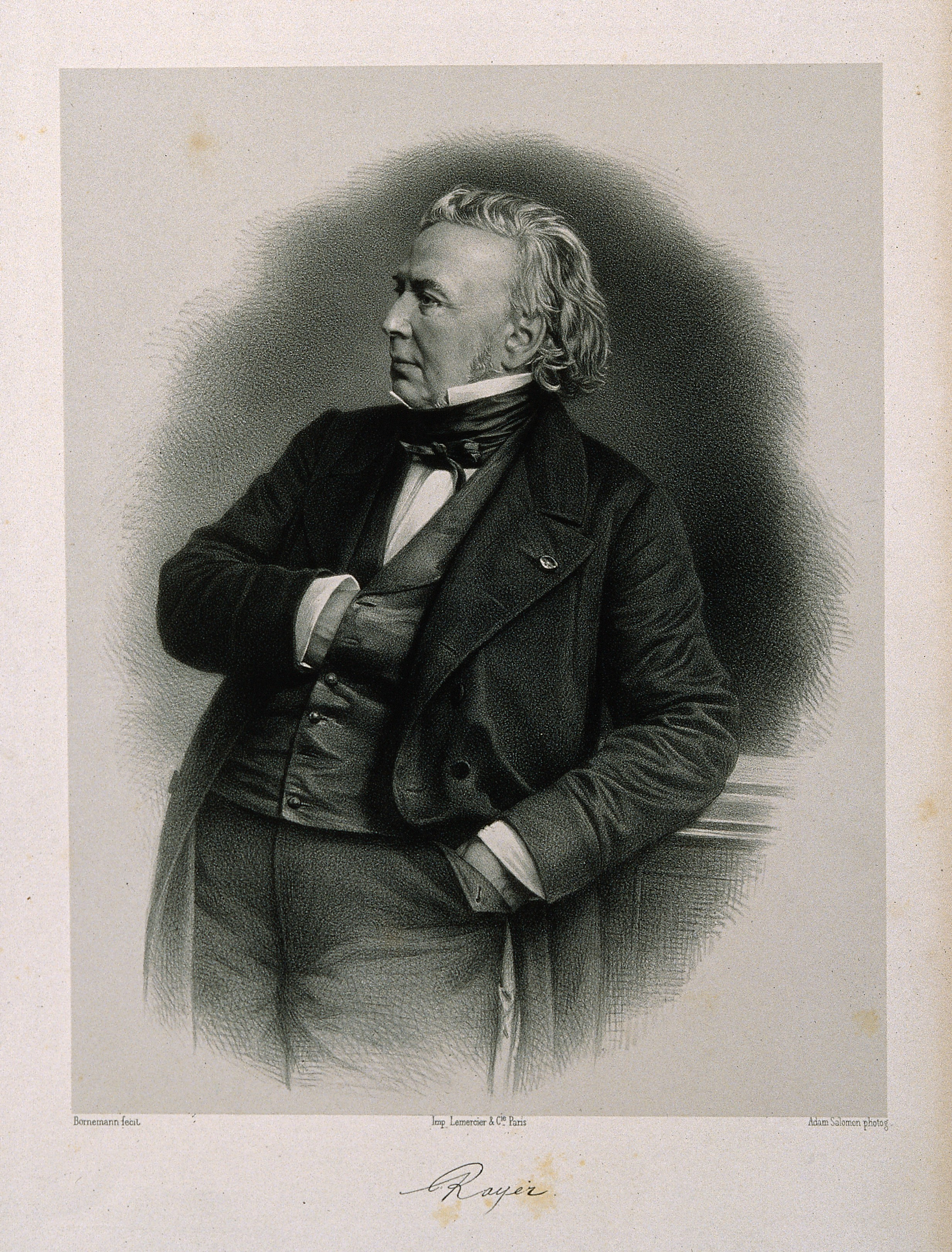 Genre/Technique: Portrait prints. Lithographs. Subject name: Rayer, Pierre François Olive, 1793-1867.